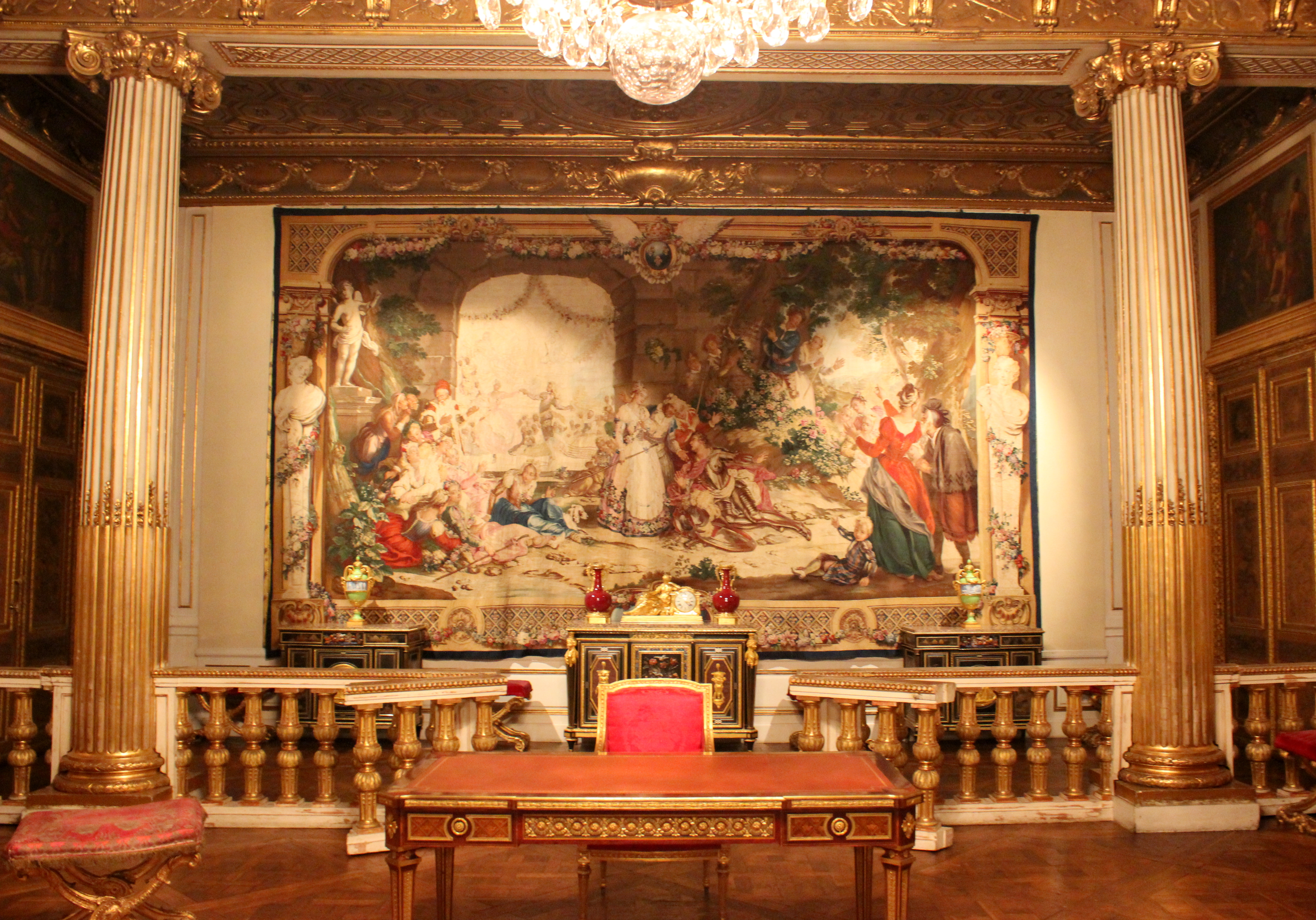 Gamla Stan, Södermalm, Stockholm, Sweden, Gustav III:s paradsängkammare i Festvåningen.